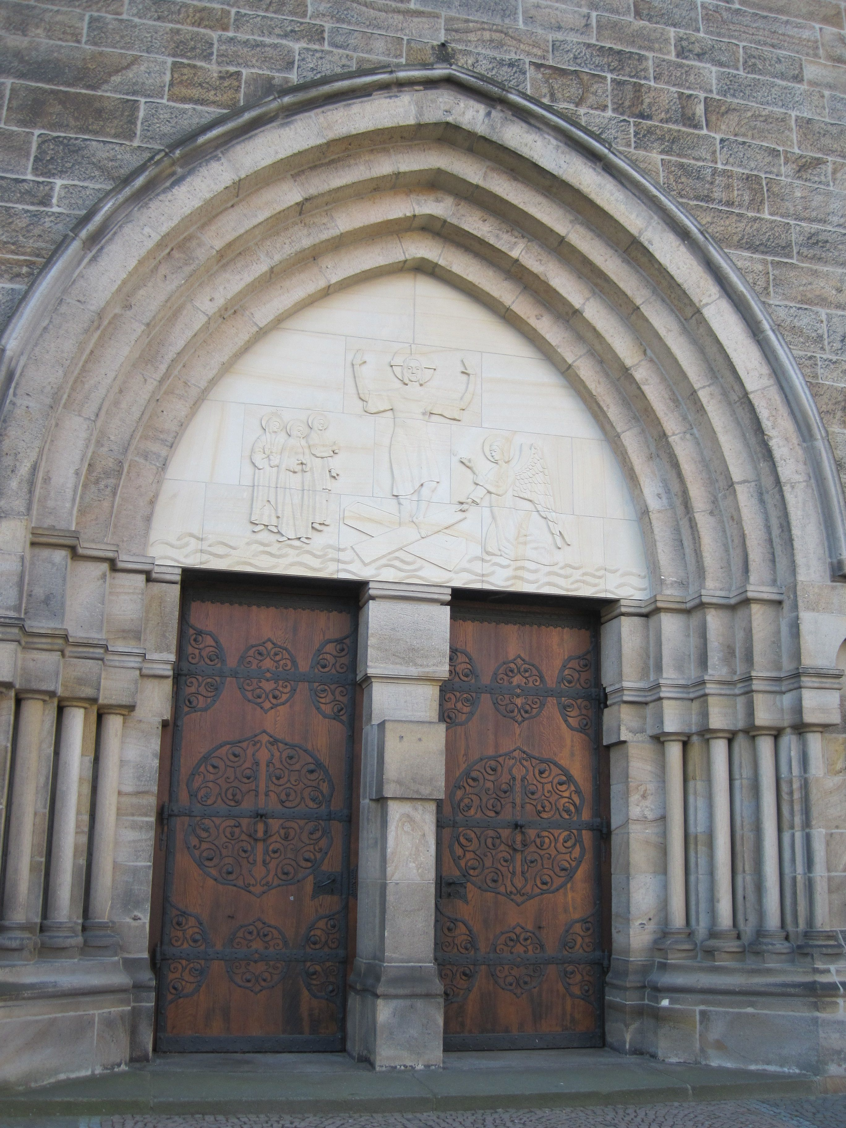 Das Foto zeigt das mittlere Eingangsportal der St. Stephanus-Kirche in Hamm-Bockum-Hövel nebst des dort befindlichen Tympanons.